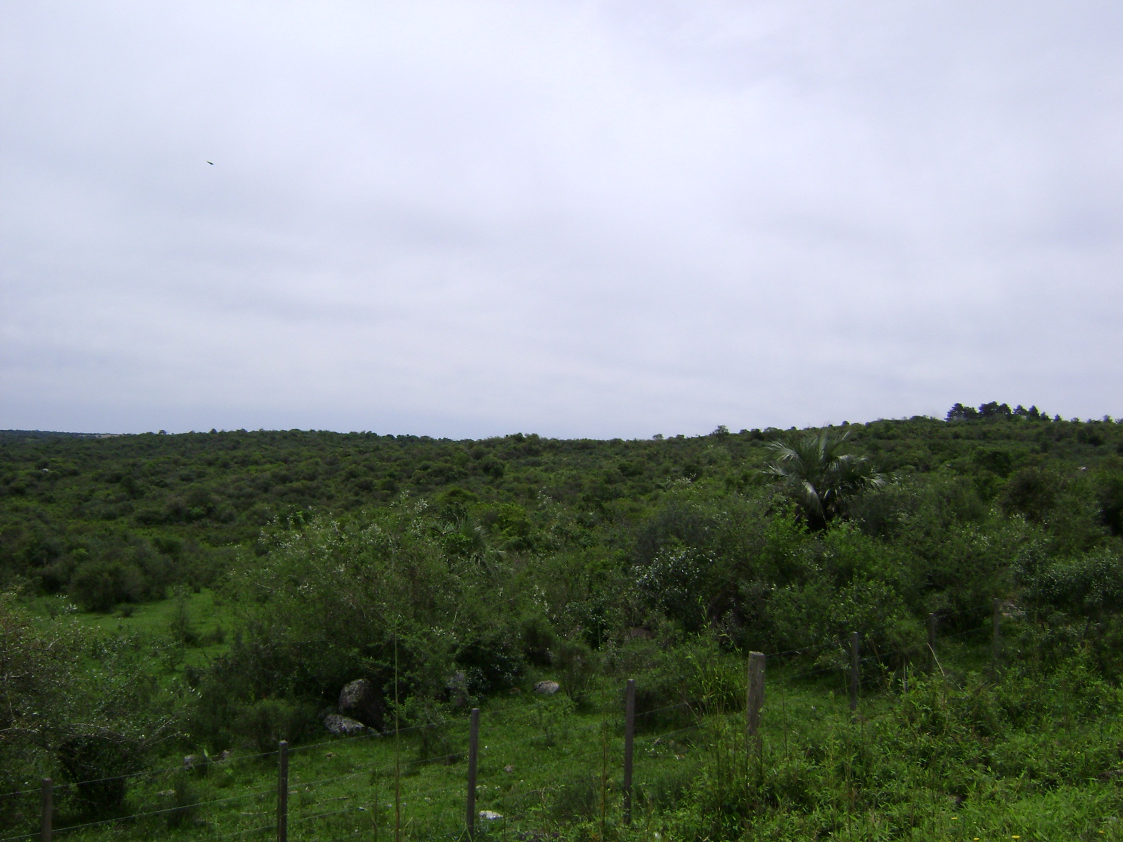 Terreno de altitude média de 350 metros (Lavras do Sul/RS)